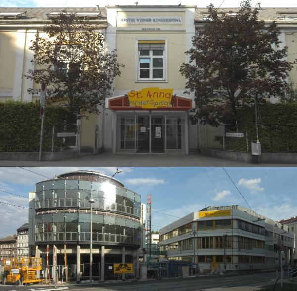 Das St. Anna-Kinderspital in Wien-Alsergrund